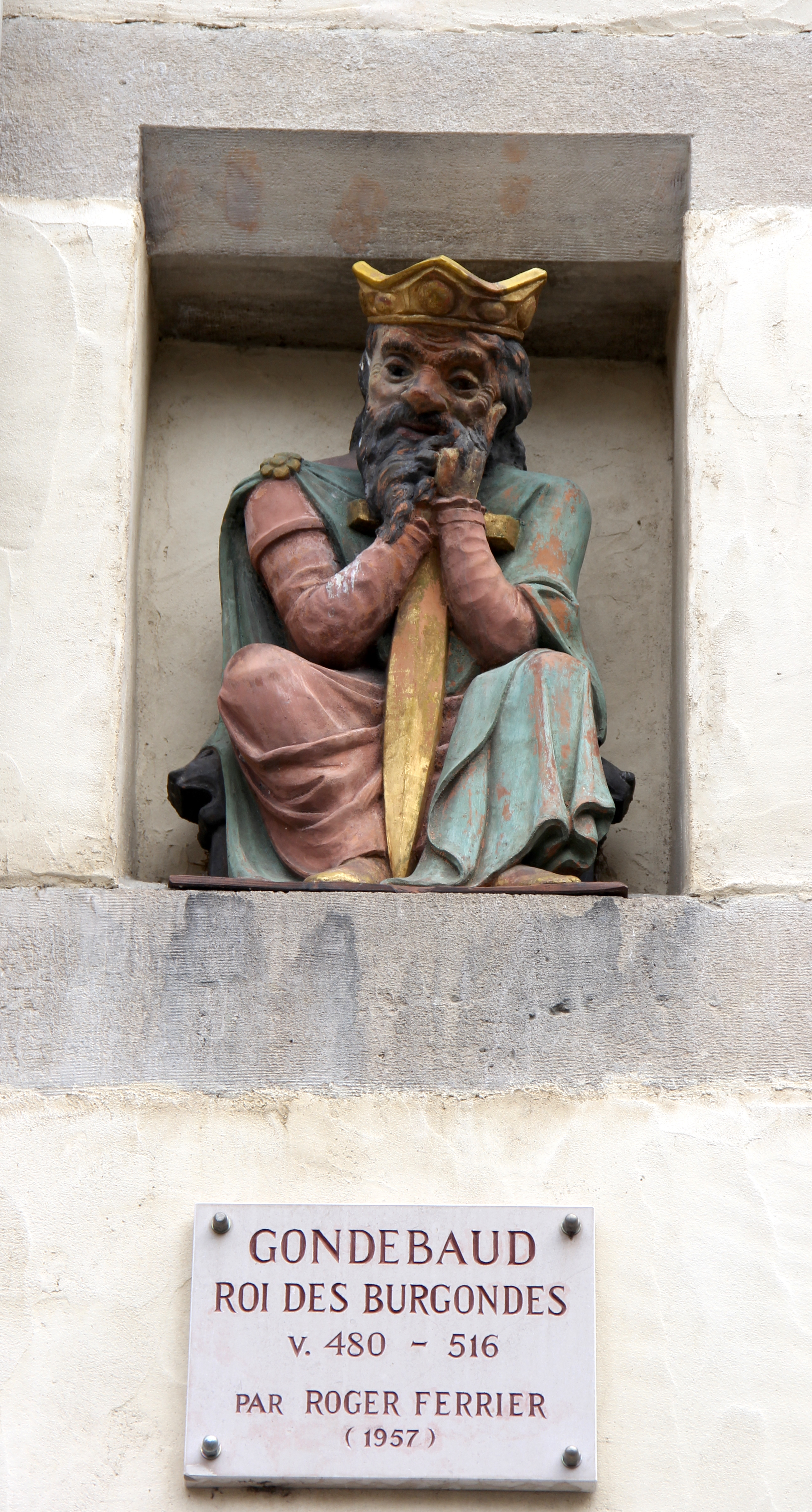 Statue de Gondebaud, roi des Burgondes. Sculpture de Roger Ferrier dans une niche sur la façade d'une maison de la place du Bourg-de-Four à Genève